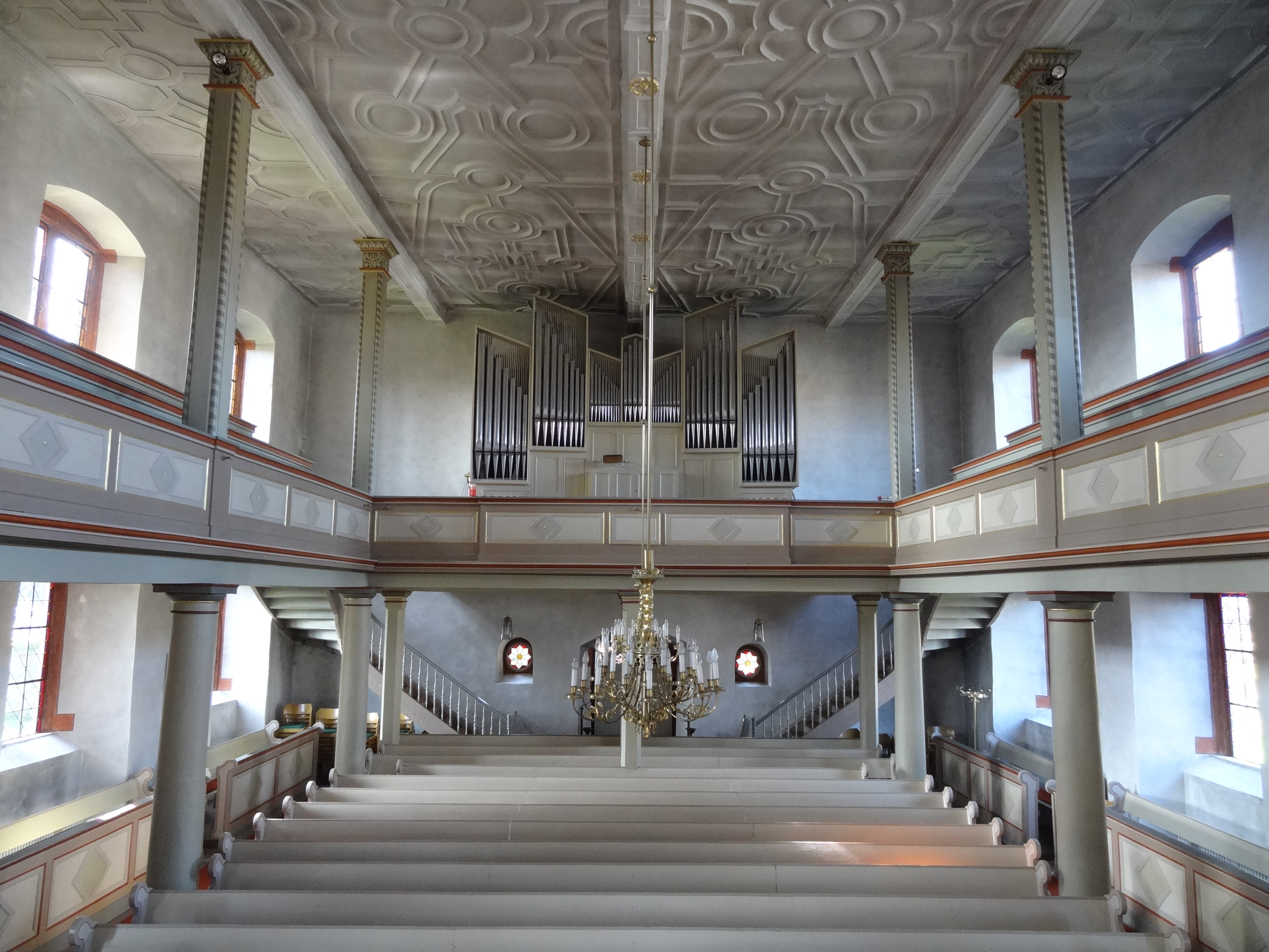 Evangelische Stadtkirche Hungen